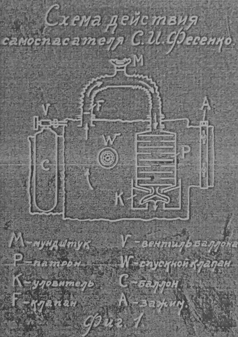 Схема действия самоспасателя С. И. Фисенко